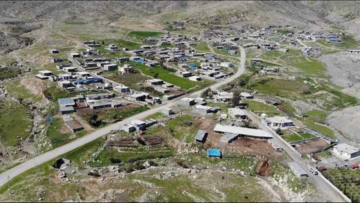 کوردی: گوندی گڵێجاڵ